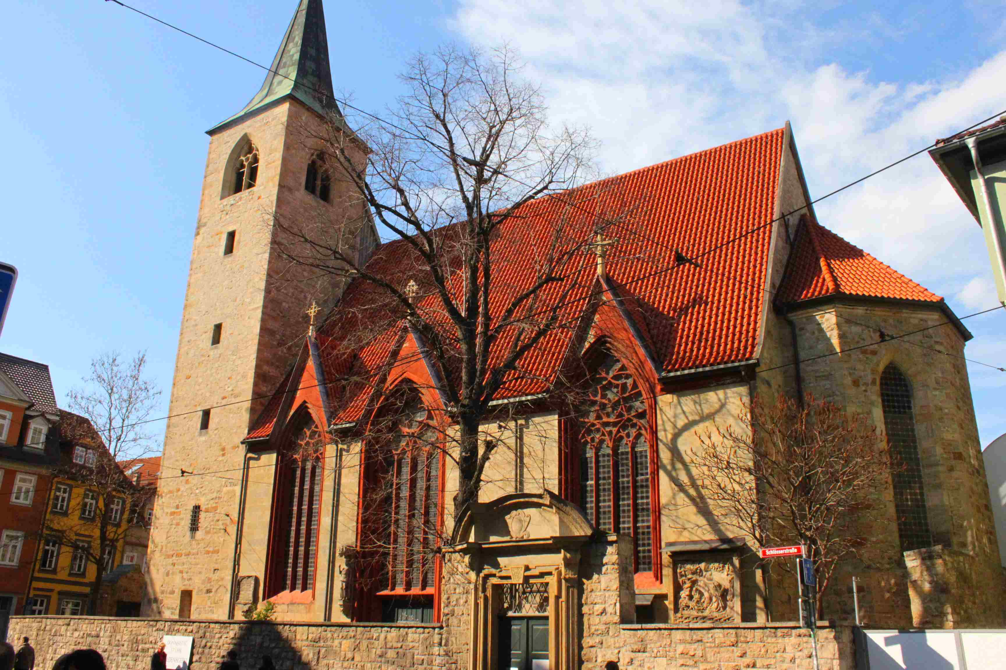 Die Lorenzkirche, Schlösserstraße, wurde 1138 gestiftet und um 1140 erbaut. Gegen 1300 wurde die heutige Kirche errichtet, die im Jahr 1413 verändert wurde nach sie gebrannt hat.